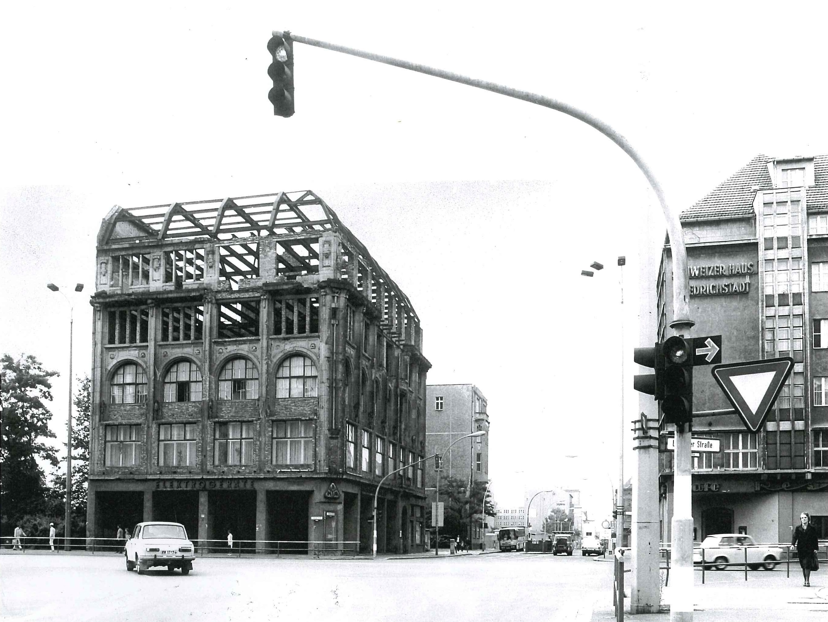 Nachkriegs-Ruine Leipziger Straße / Ecke Friedrichstraße in Blickrichtung Grenzübergang/ Checkpoint Charly